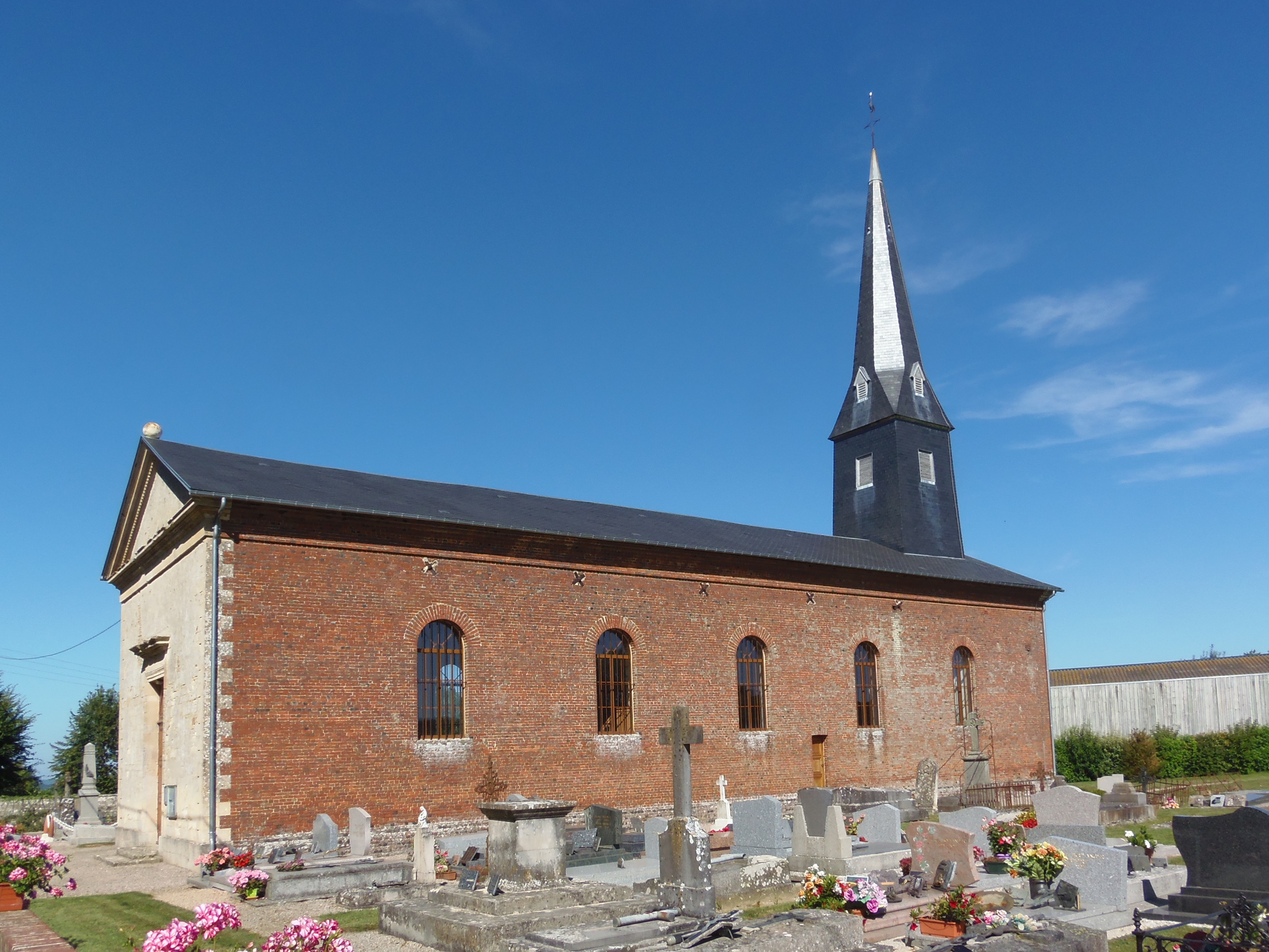 Saint-Gervais-des-Sablons (Normandie, France). L'église Saint-Gervais.